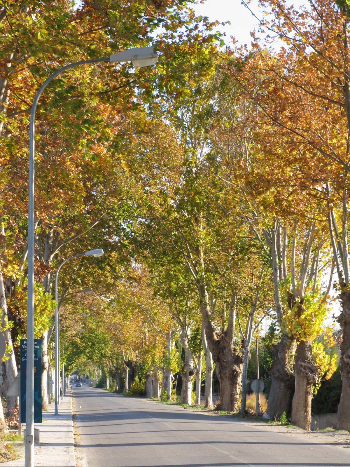 C/Paseo de la Reina, en Fuente Vaqueros (Granada, España)